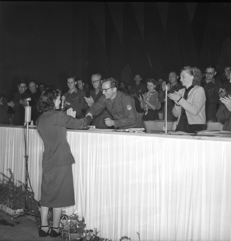 ADN-ZB/Klein IV. Parlament der Freien Deutschen Jugend in Leipzig 1952 (29.5.52) UBz.: Raymonde Dien, die tapfere französische Friedenskämpferin, überreicht Erich Honecker eine Buchspende der werktätigen Jugend Frankreichs. Rechts Ortrud Müller, Frau des am 17.5.52 von der Lehr-Polizei in Essen ermordeten Patrioten Philipp Müller. Links neben Honecker (mit Brille) Heinz Lippmann, Sekretär des Zentralrates der FDJ.